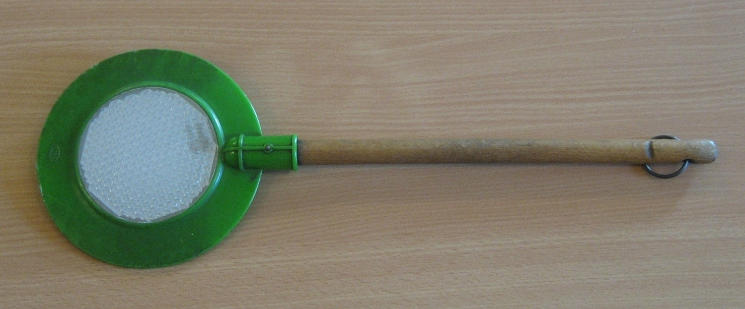 ein ÖBB-Befehlsstab